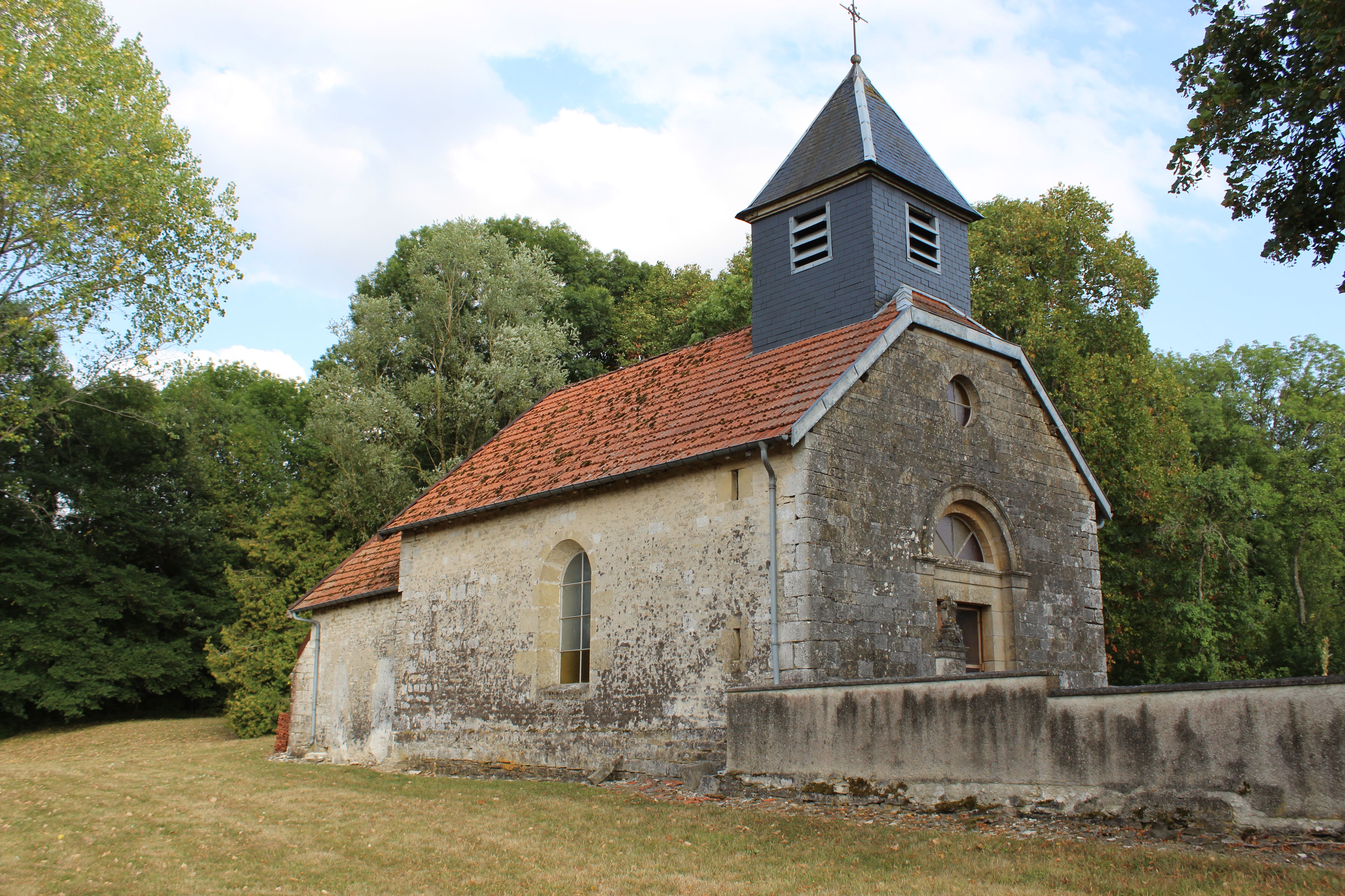 L'église